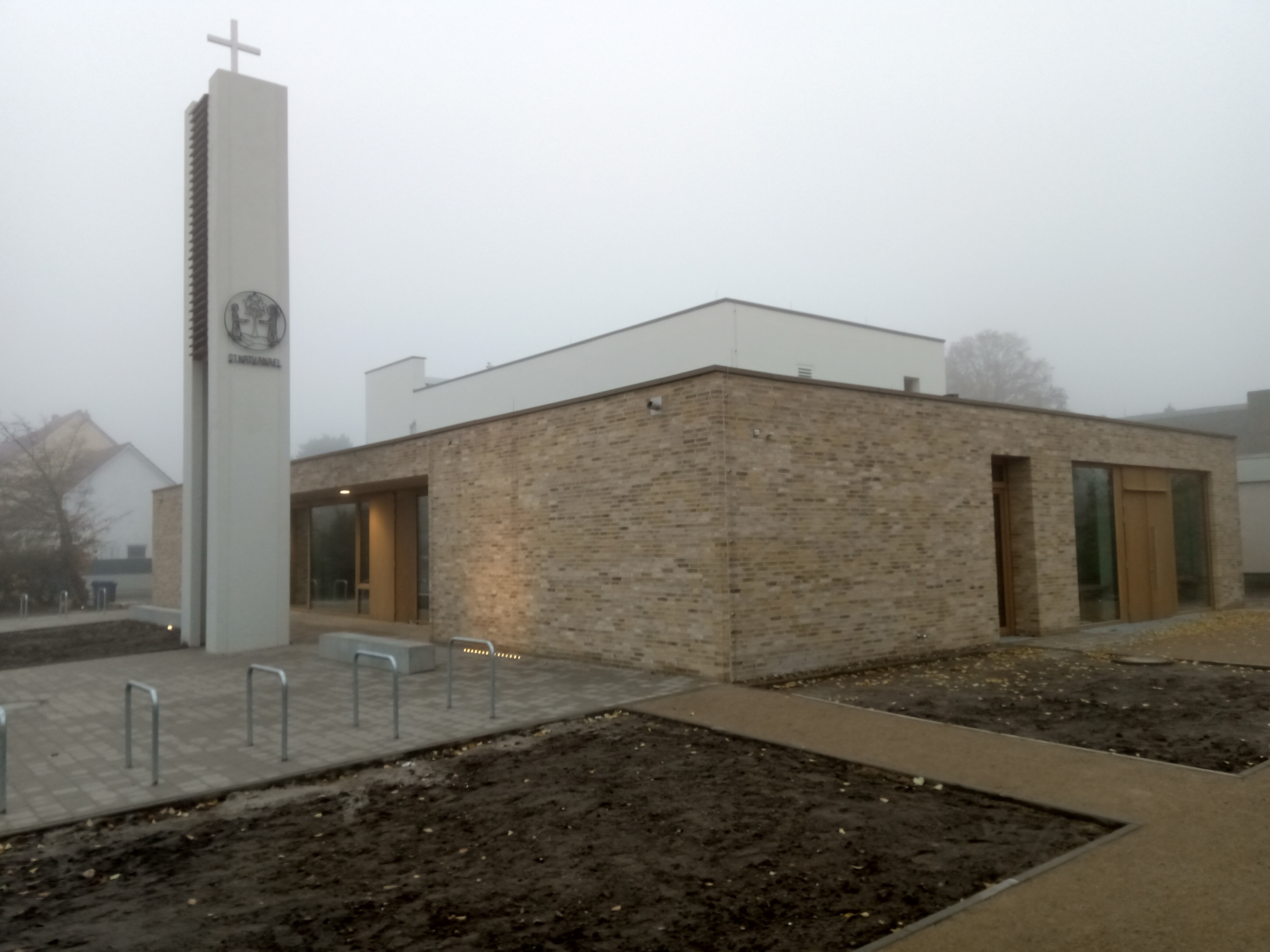 St. Nathanaelkirche Hannover von Nordosten, Aufnahme von November 2019 nach Einweihung des Neubaus